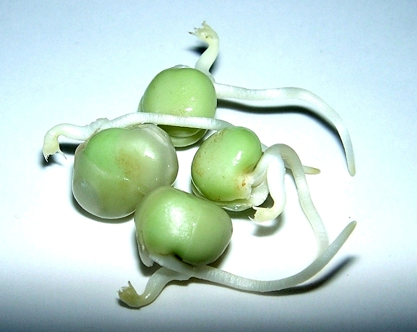 Bild på groddar av gröna ärter. Foto: Användare:Chrizz